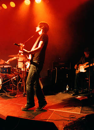 Är själv upphovsman. .